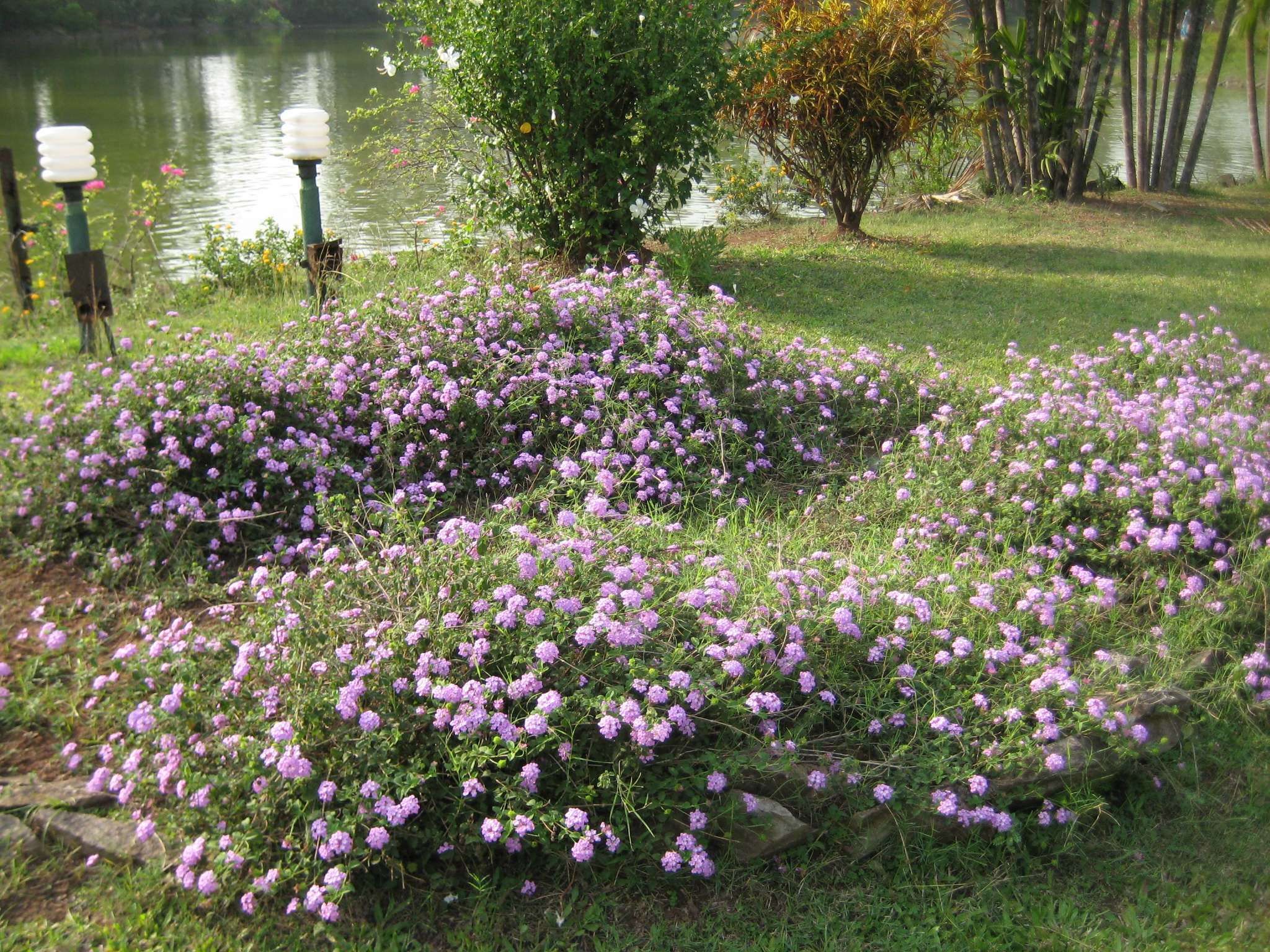 Blossom, Vanganga Lake, Dadra